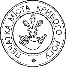 uk:?????????:??????????